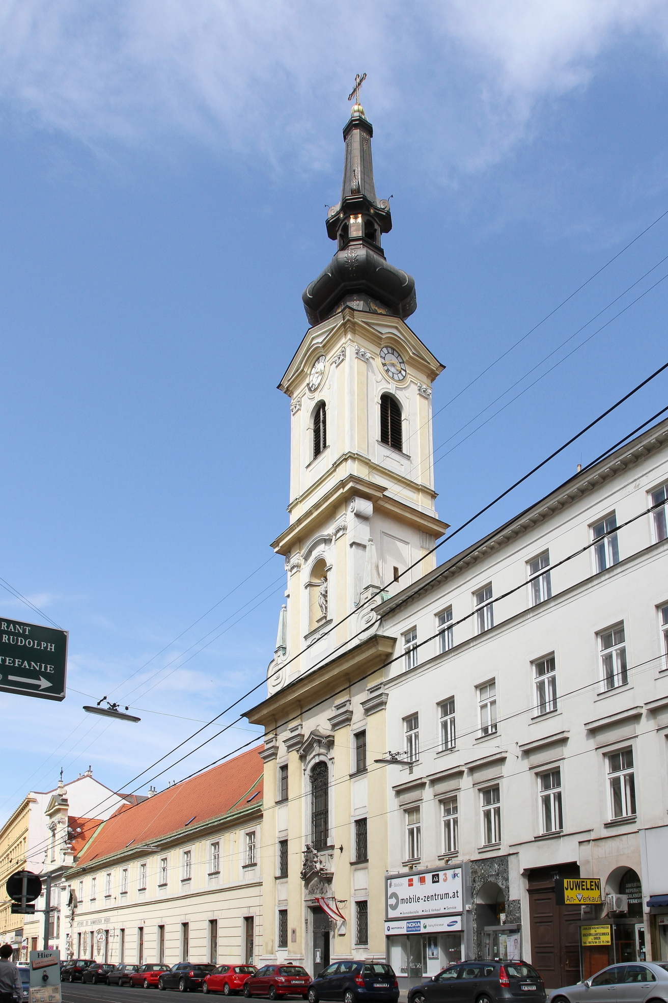 Die Klosterkirche der Barmherzigen Brüder im 2. Wiener Gemeindebezirk Leopoldstadt.